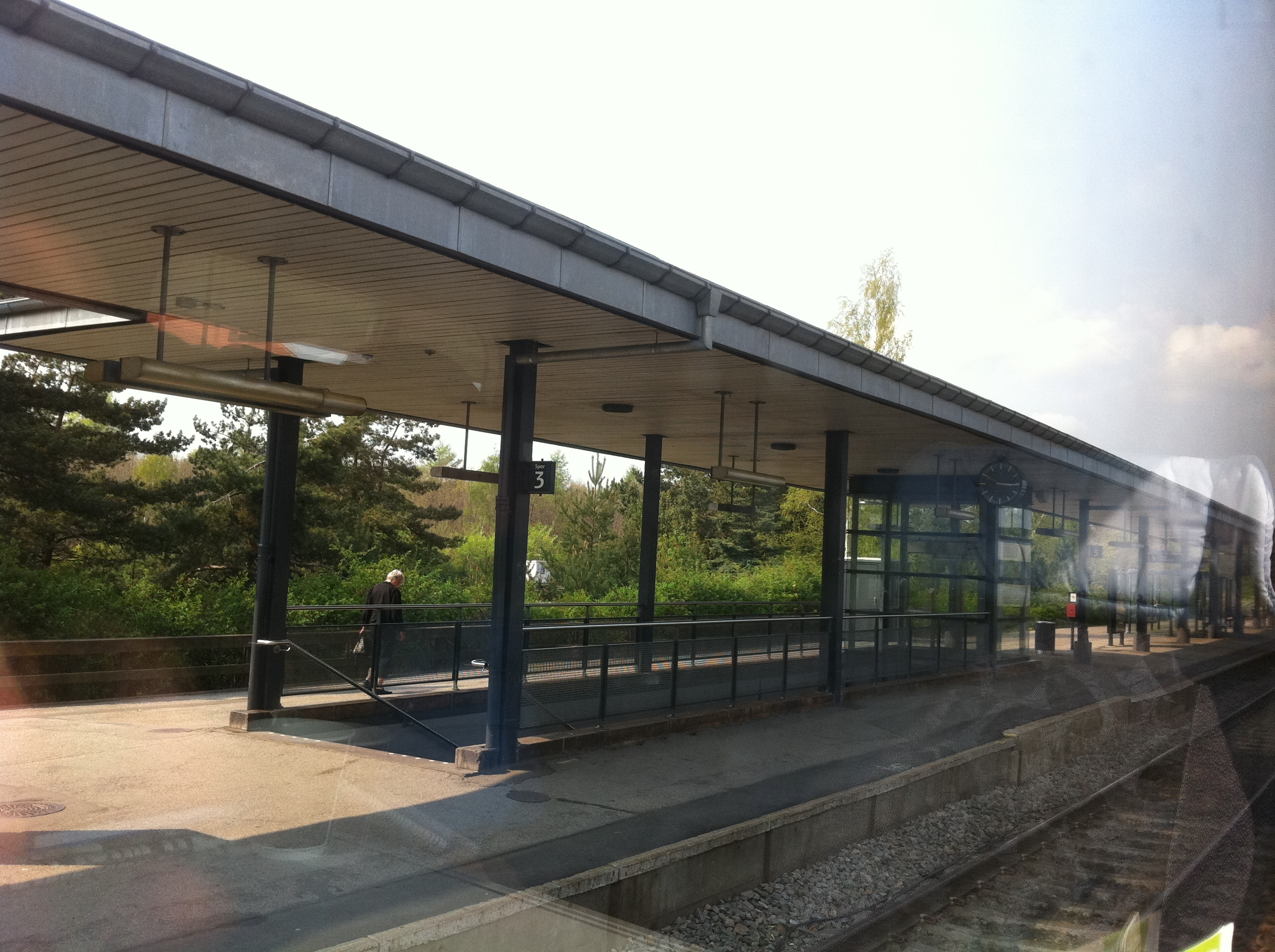 Horsens Banegård